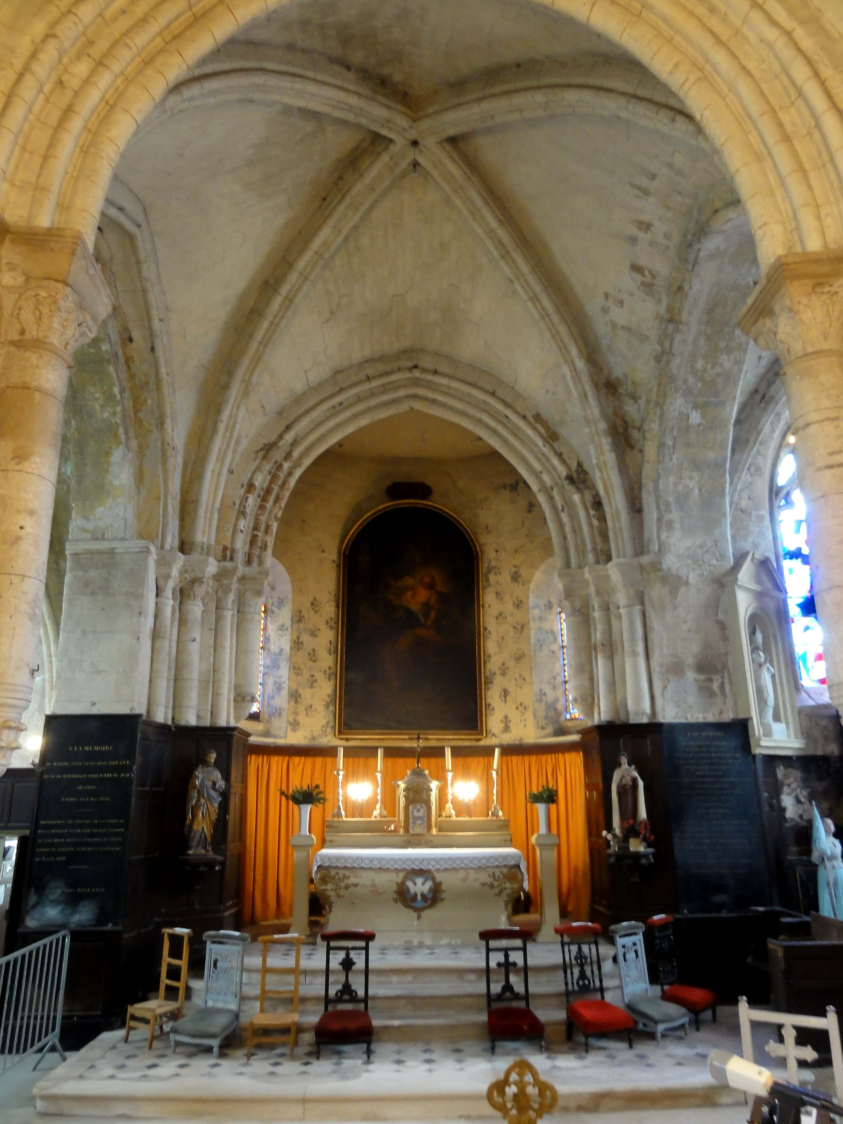 Intérieur de l'église Saint-Pierre-et-Saint-Paul (voir titre).